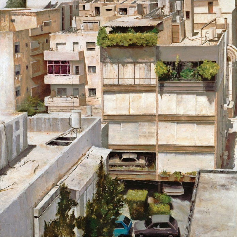 תל אביב 2, 1999 שמן על בד, גובה 140סמ' מוזיאון תל אביב, אוסף משרד החוץ